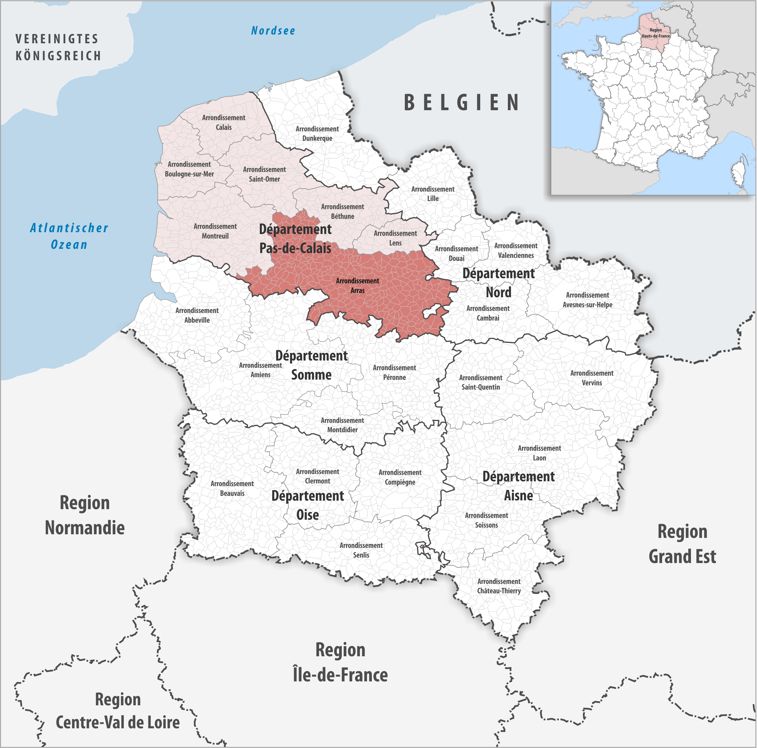 Lage des Arrondissements Arras